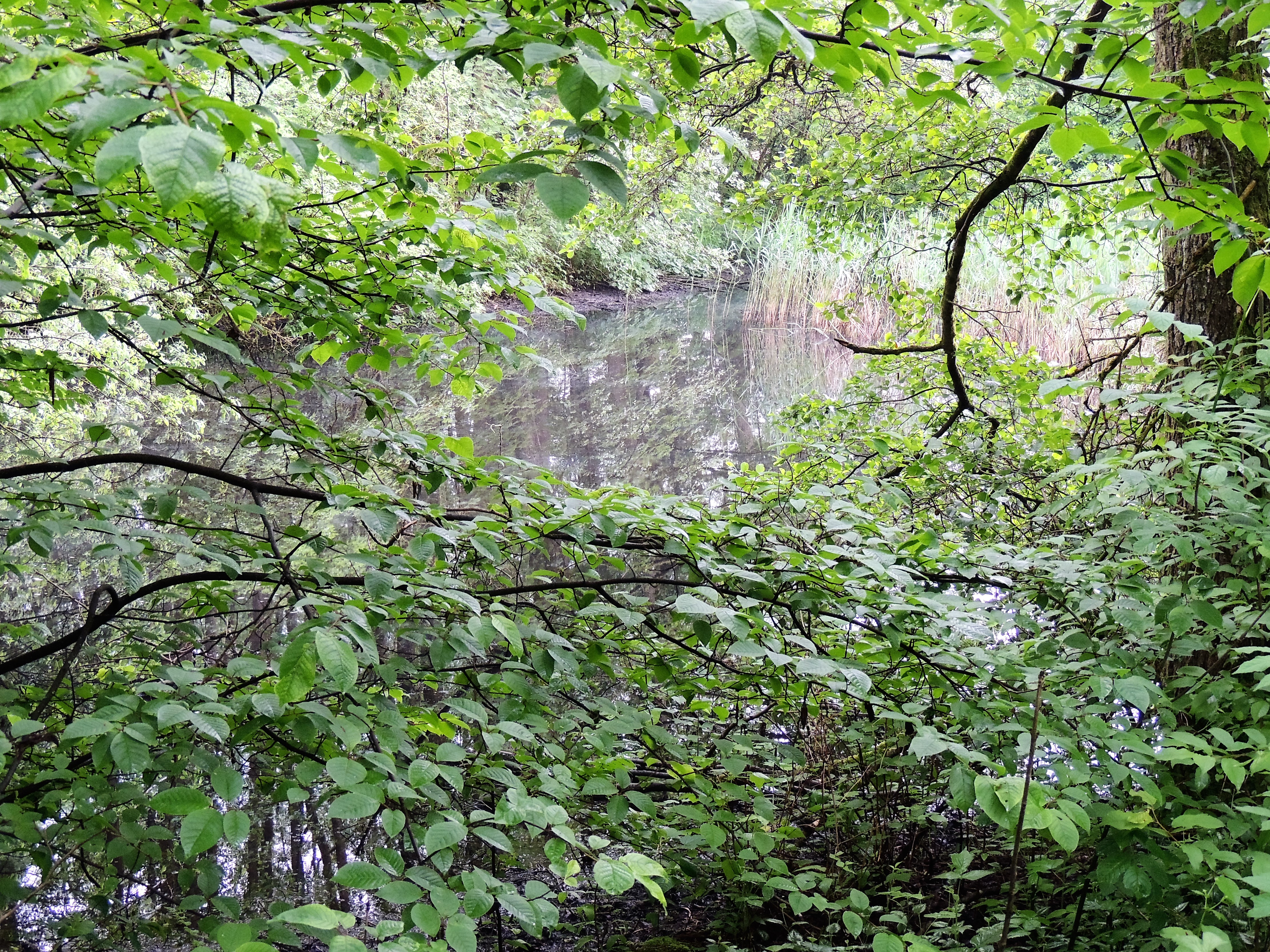 (LSG:BY-LSG-00334.01)_LSG Degen in der Gemarkung Küps und Au